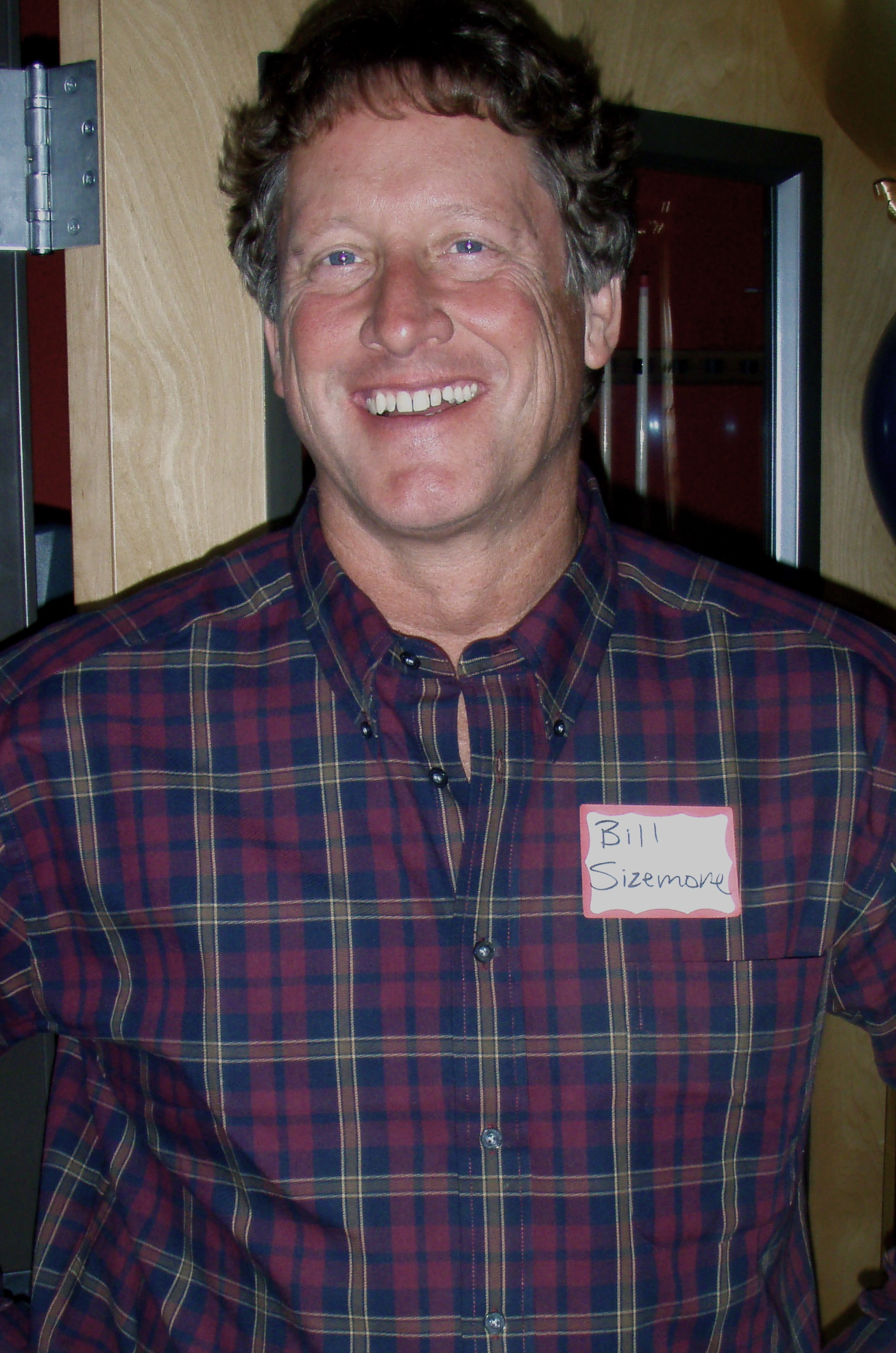 Bill Sizemore, conservative political activist in Oregon